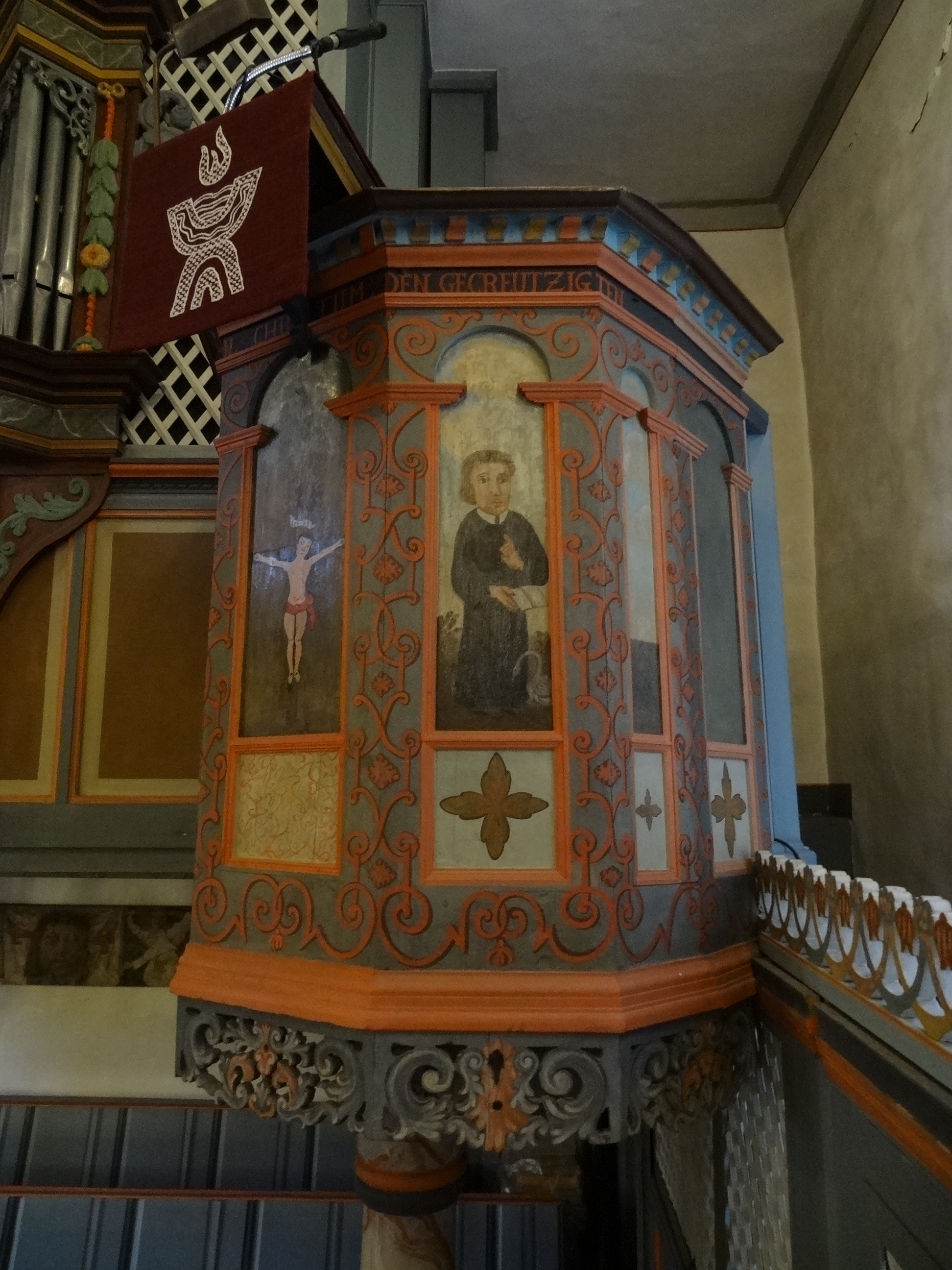 Evangelische Kirche Dornholzhausen